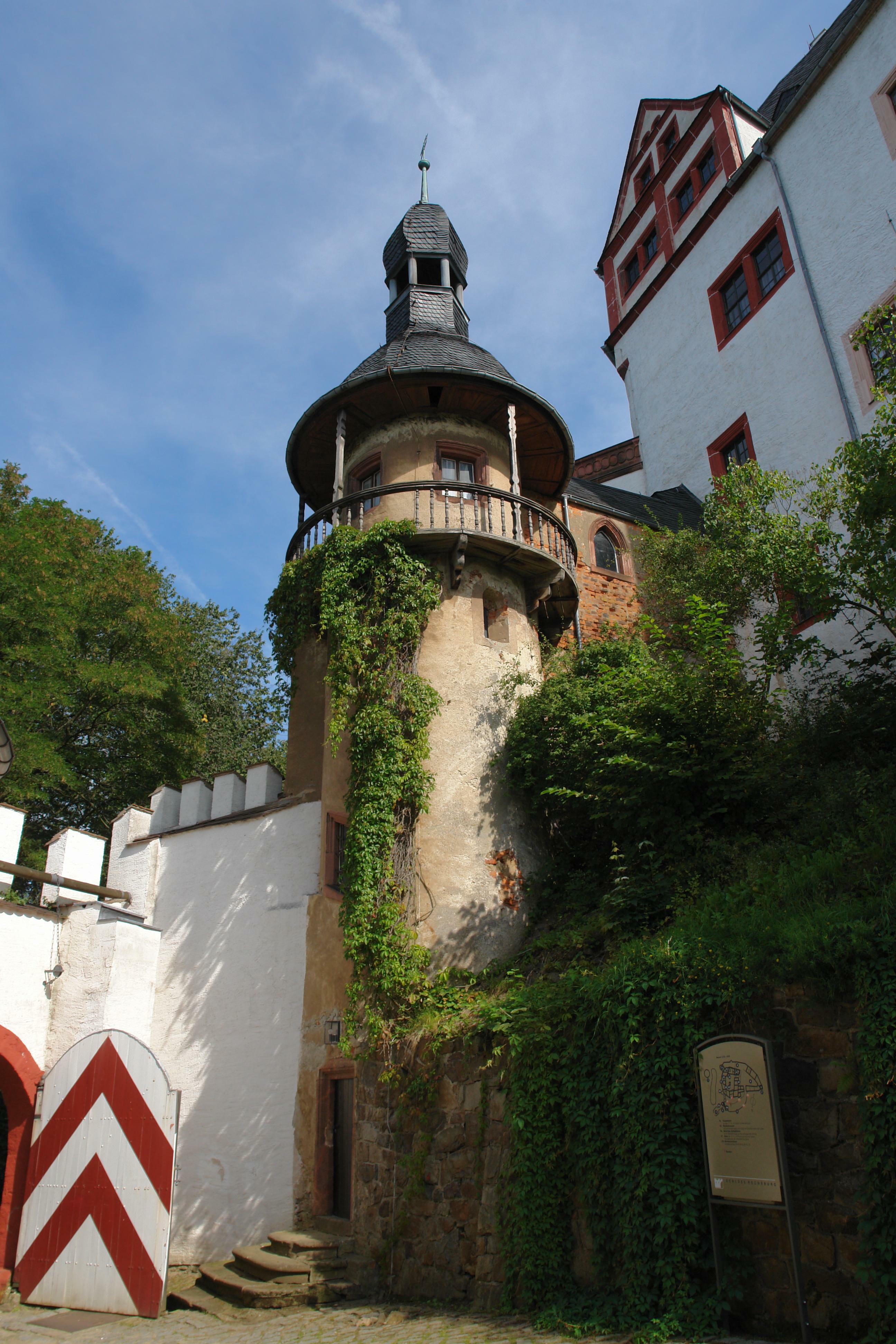 Rochsburg-Eingang